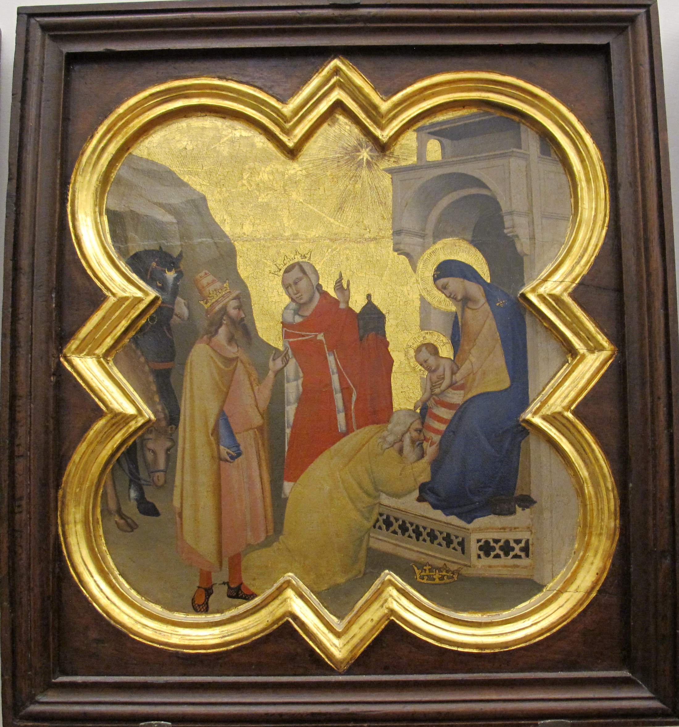 Galleria dell'Accademia, Florence